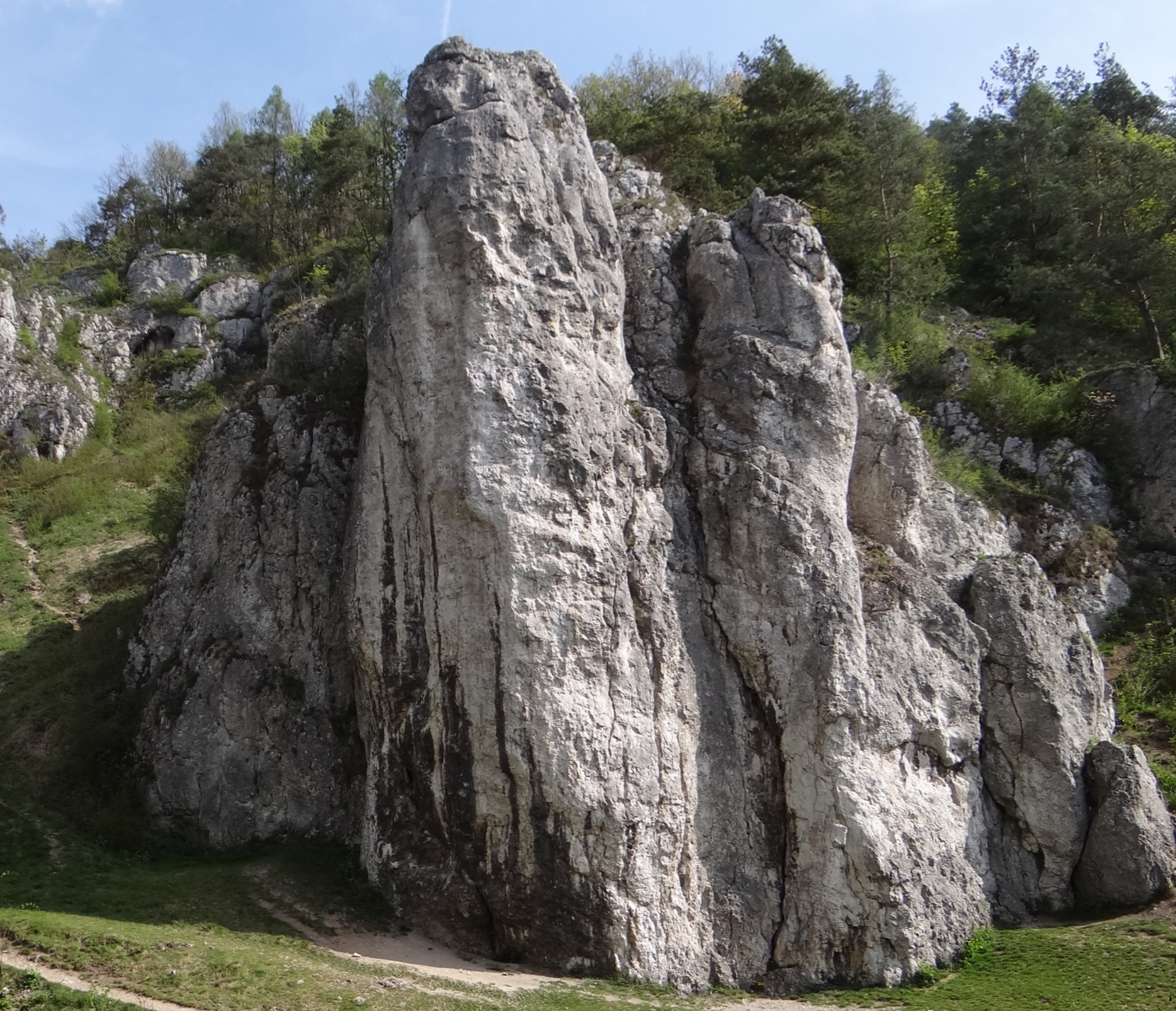 Filar Abazego w Dolinie Bolechowickiej